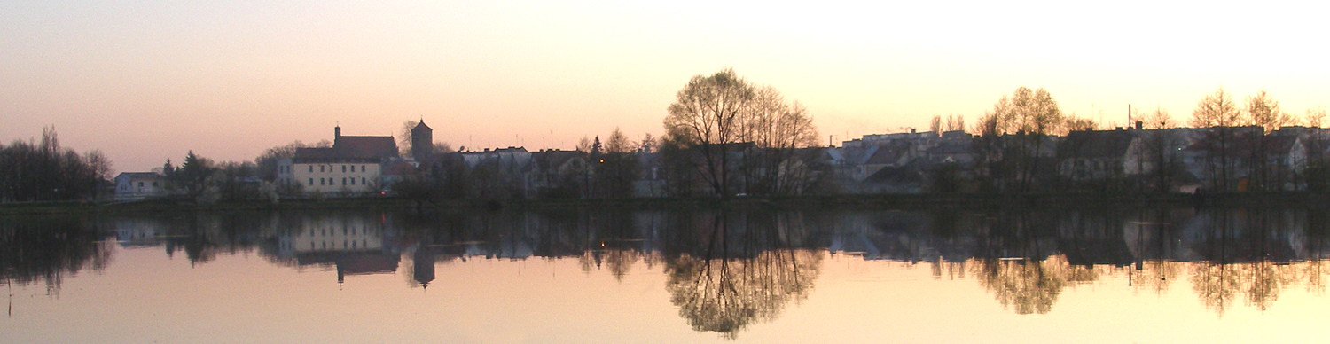 Panorama Makowa Mazowiecki